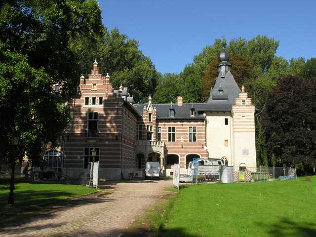 Zaventem Mechelsesteenweg 98